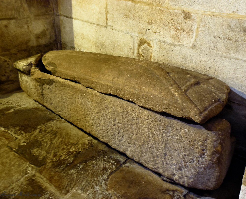 Sepulcro de Trahamunda no Convento de San Xoán de Poio.